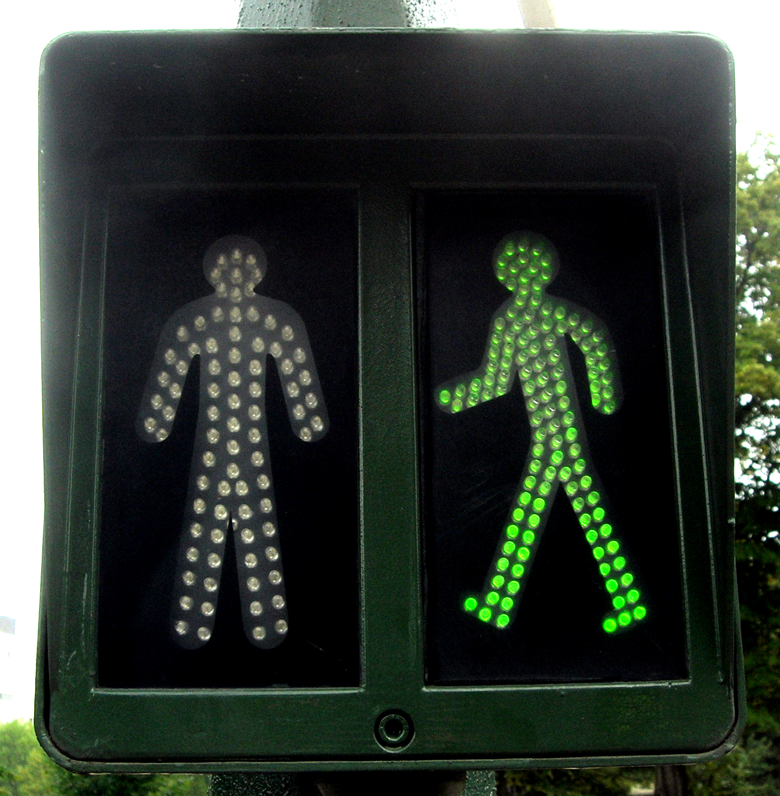 Description =Feux autorisant un piéton à traverser un passage protégé à Paris Date =Septembre 2006 Author =Remi Jouan